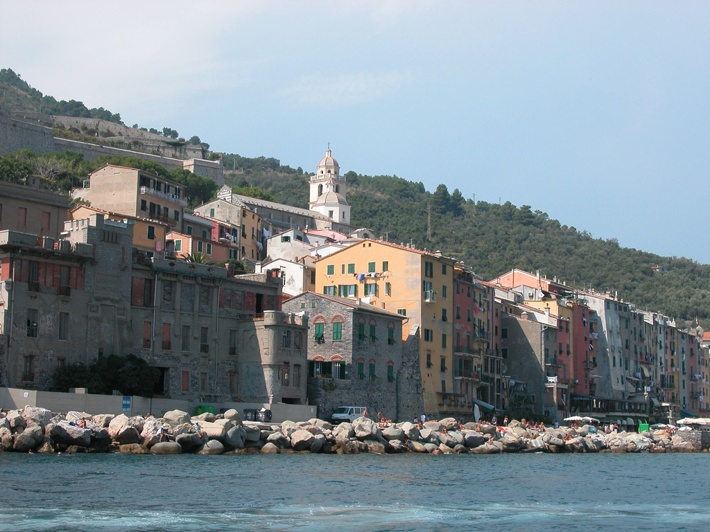 Porto venere, Liguria, Italia